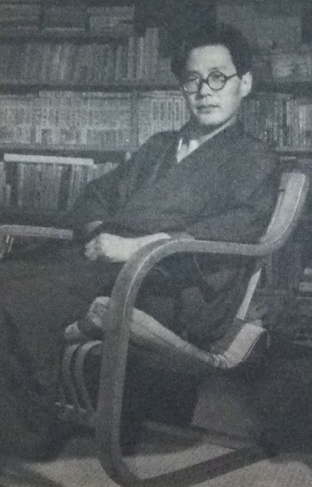 石田波郷